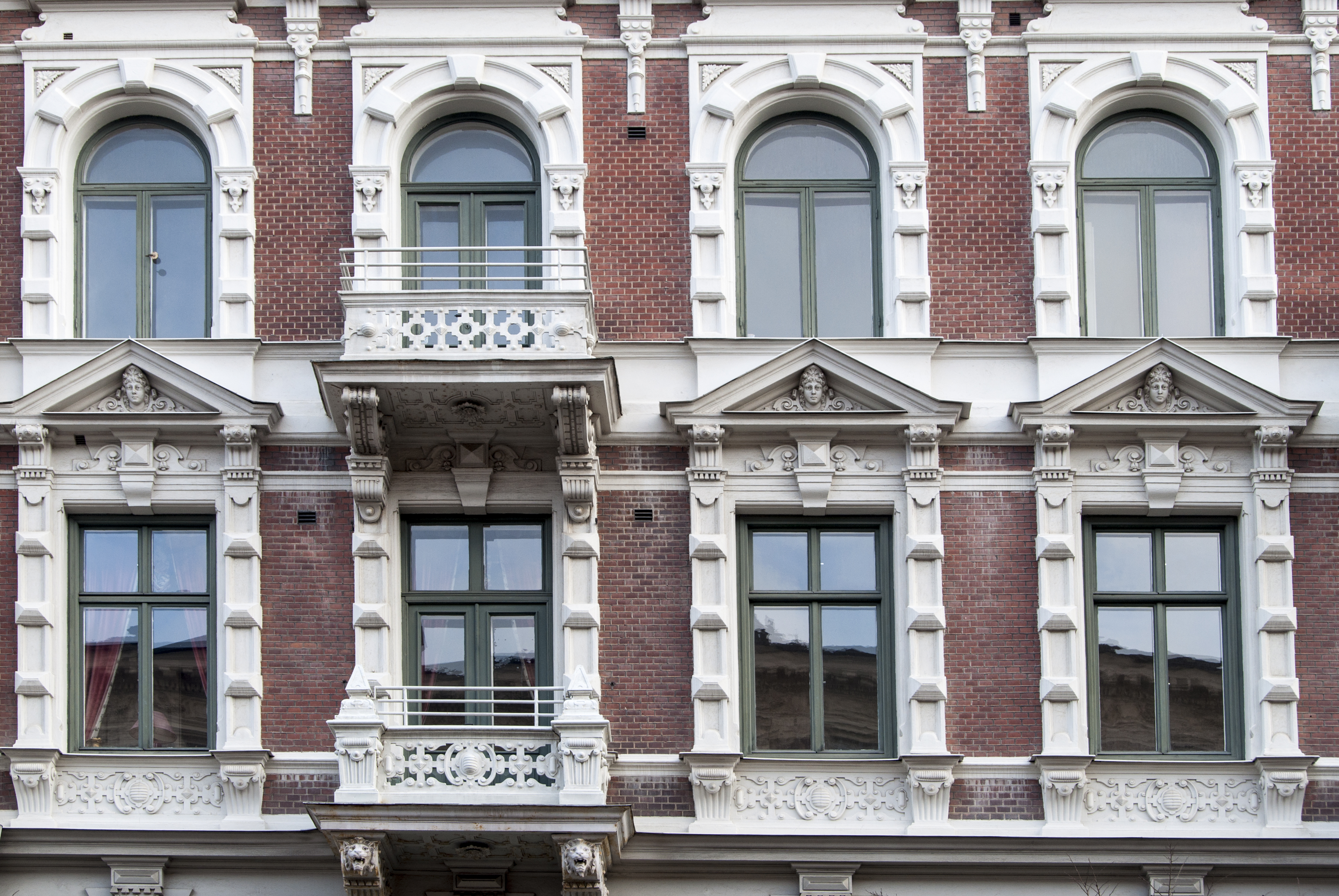 Björken 18, Valhallavägen 94 / Floravägen, Nybyggnadsår 1885 - 1886, Fredrik Dahlberg (Arkitekt) Lars Östlihn (Byggherre) Lars Östlihn (Byggmästare) Robert Walfrid Alderin (Byggherre) Robert Walfrid Alderin (Byggmästare)